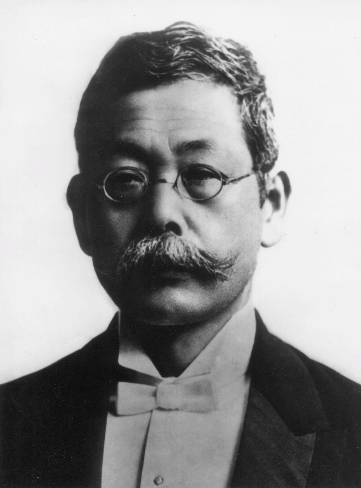 大森房吉（1868-1923）